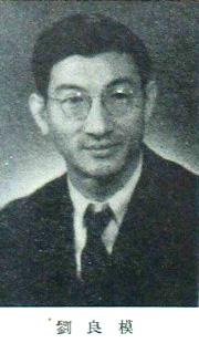 中國人民政治協商會議第一屆全體會議代表